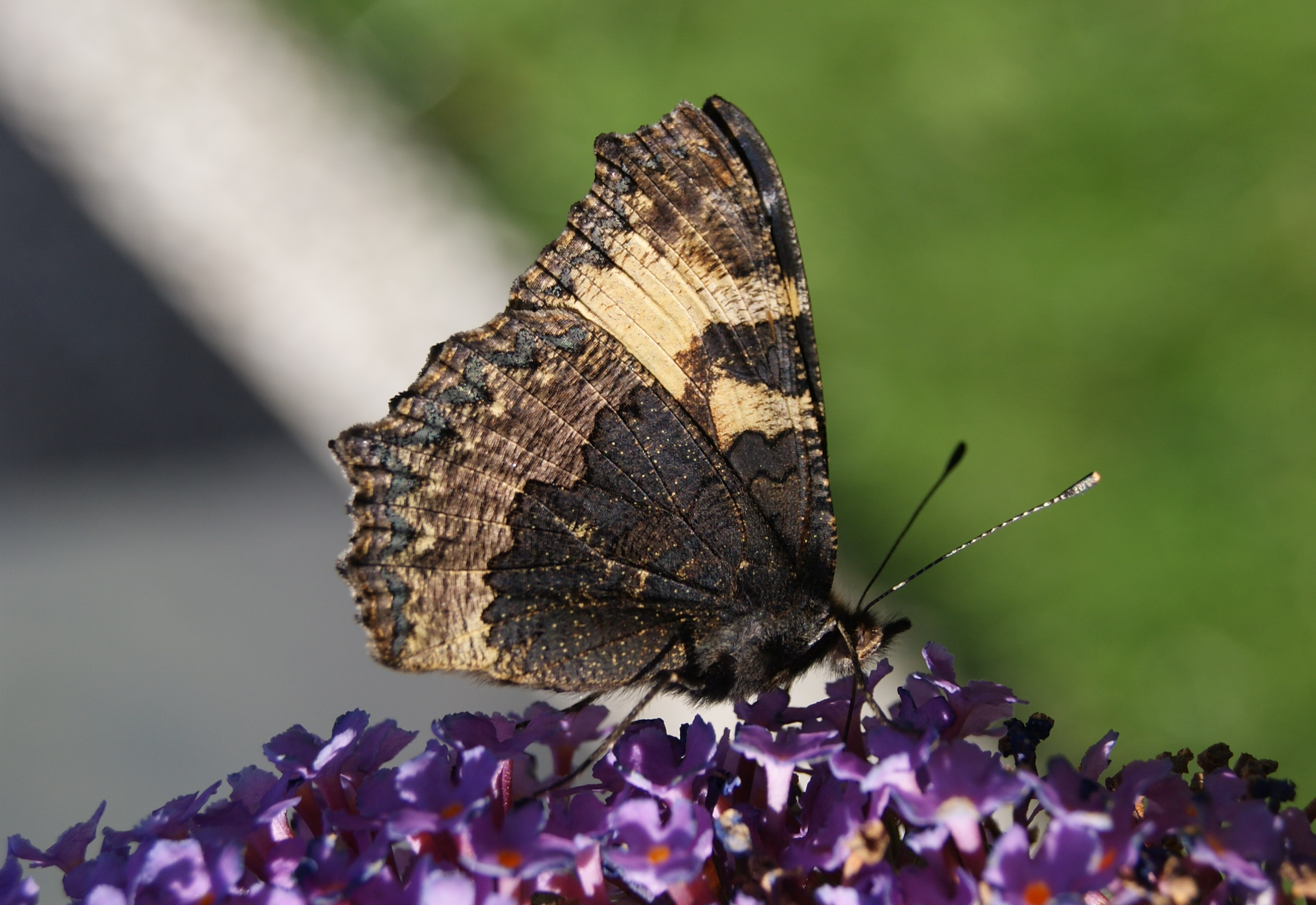 Aglais urticae